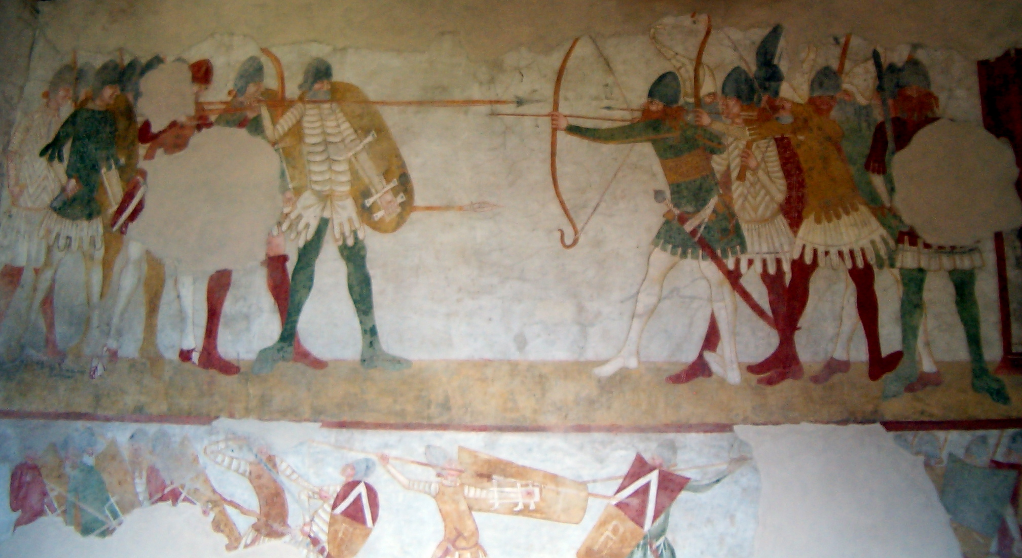 Castello di Avio (Trentino, Italy)